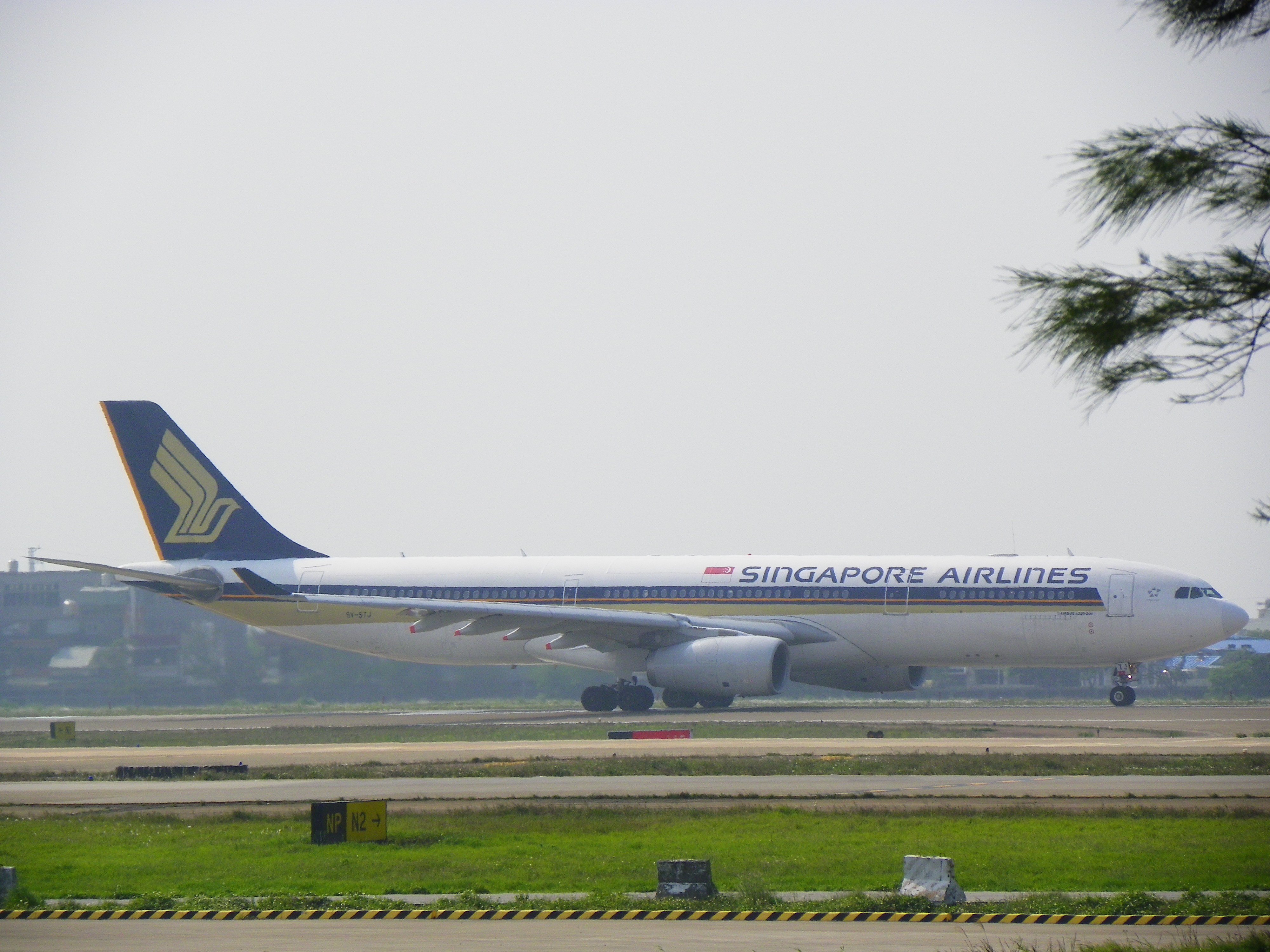 桃園國際機場北跑道起飛中的新加坡航空空中巴士A330-300 9V-STJ。